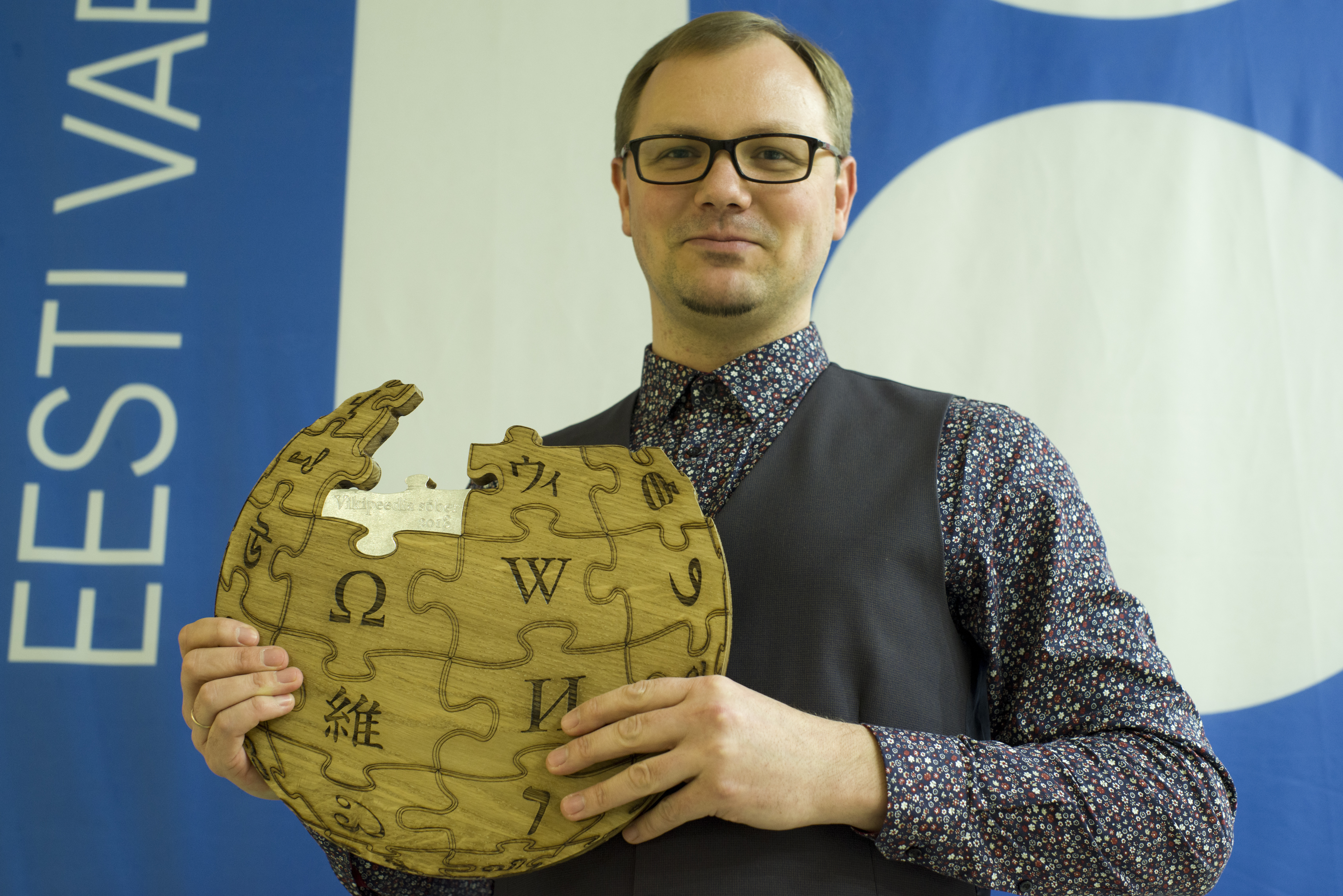 Eestikeelse Vikipeedia sünnipäeval 15.01.2019 kuulutati välja Vikipeedia Sõber 2018. Nominendiks osutus Ulvar Käärt. Pildil on ta koos äsja kätte saadud auhinnaga.